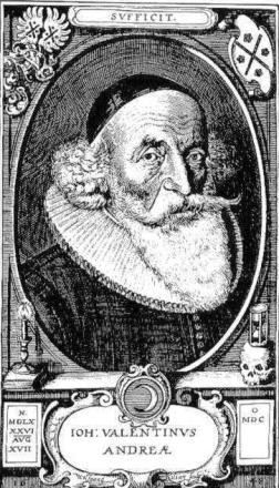 Johann Valentin Andreae à la fin de sa vie.